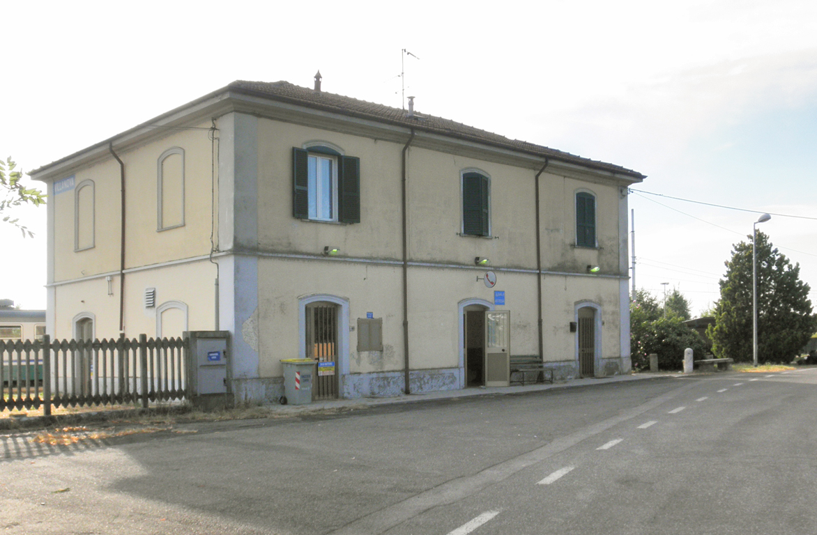 Stazione ferroviaria di Villanova d’Arda, il fabbricato viaggiatori lato strada.